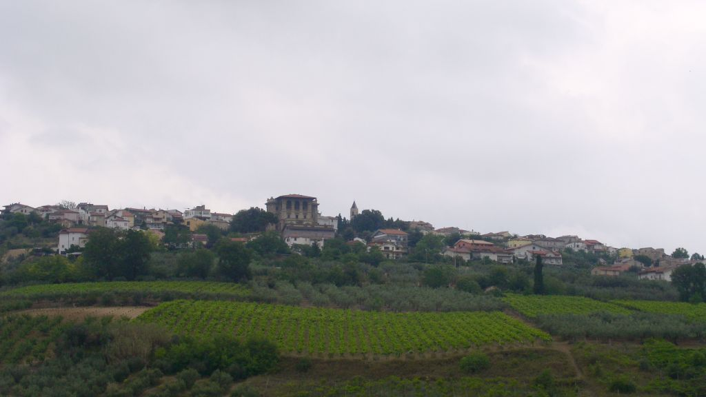 Panorama del paese (veduta dall'area verde "Lu Vallone"). Mozzagrogna (CH), 3 giugno 2007. Foto scattata da me.